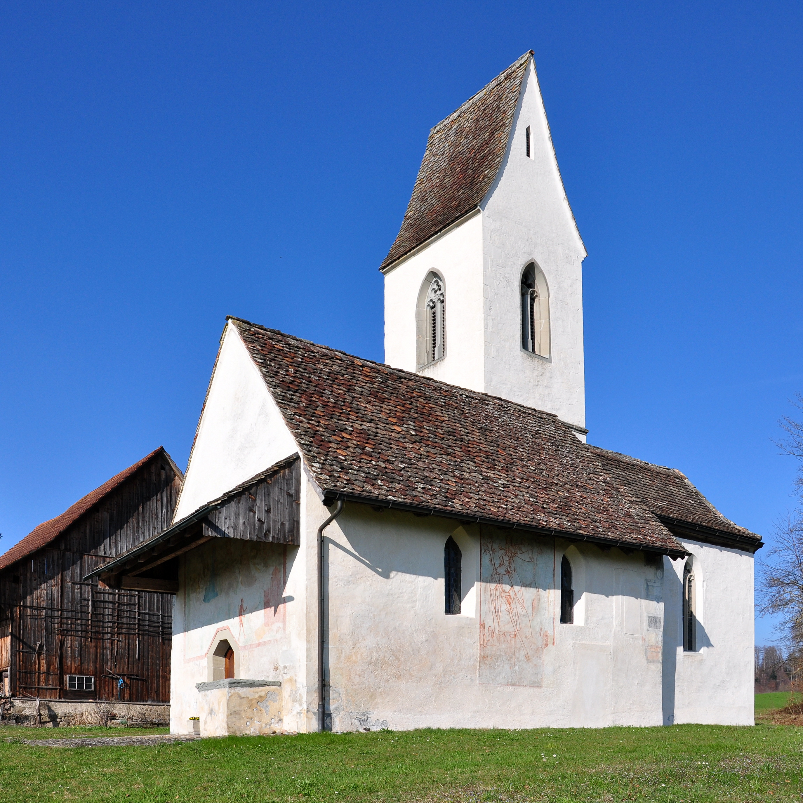 St. Dionys in Jona-Buech St. Dionys (Switzerland)